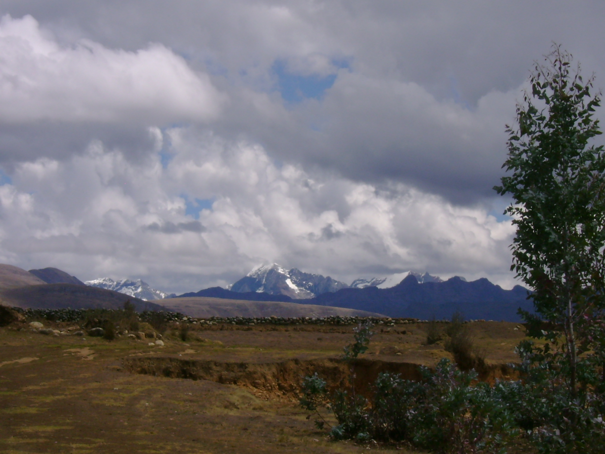 Vista desde el filo de Huánuco Pampa. Cordillera Huallanca